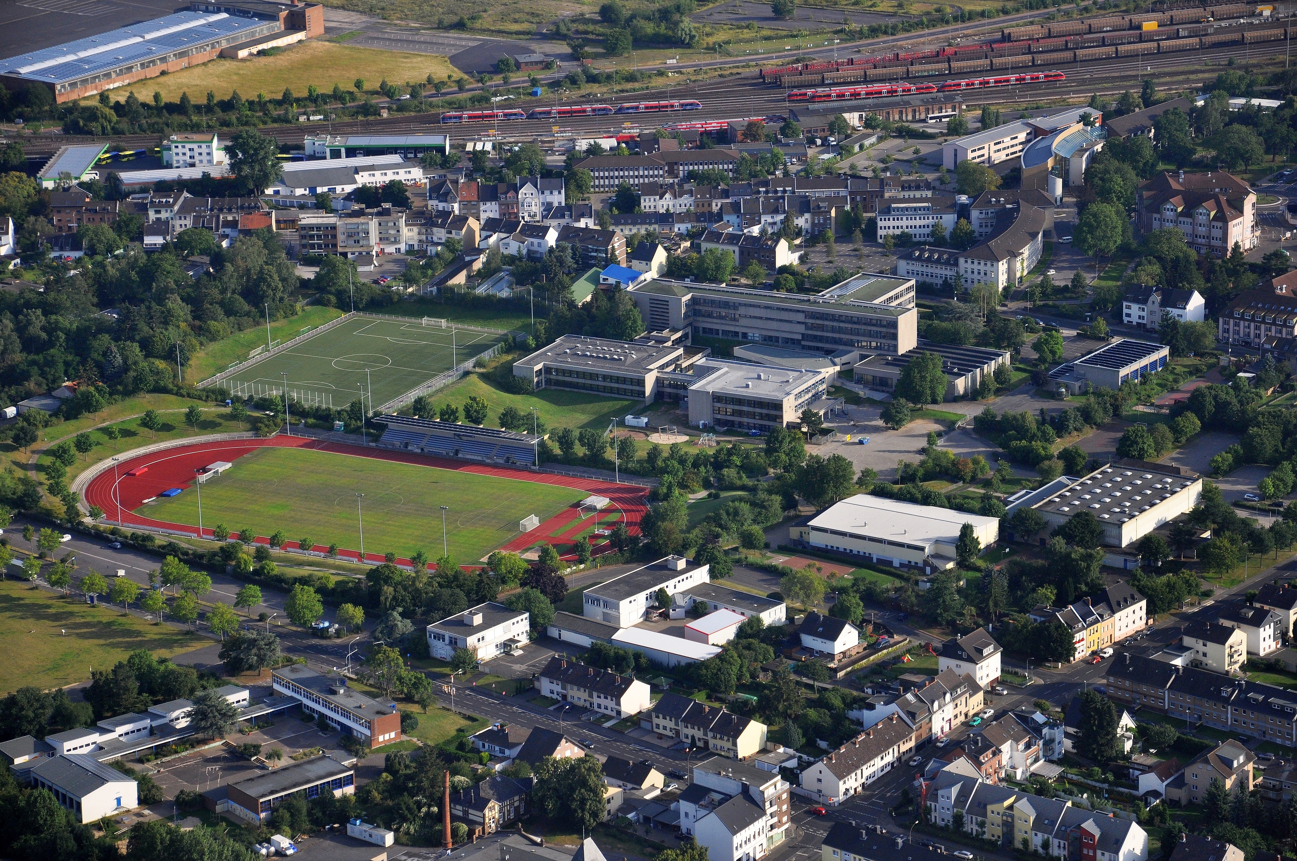 Luftbild Euskirchen aus N-Richtung mit Erftstadion, Emil-Fischer-Gymnasium, GGS Nordstadt, Stadtverwaltung, Amtsgericht